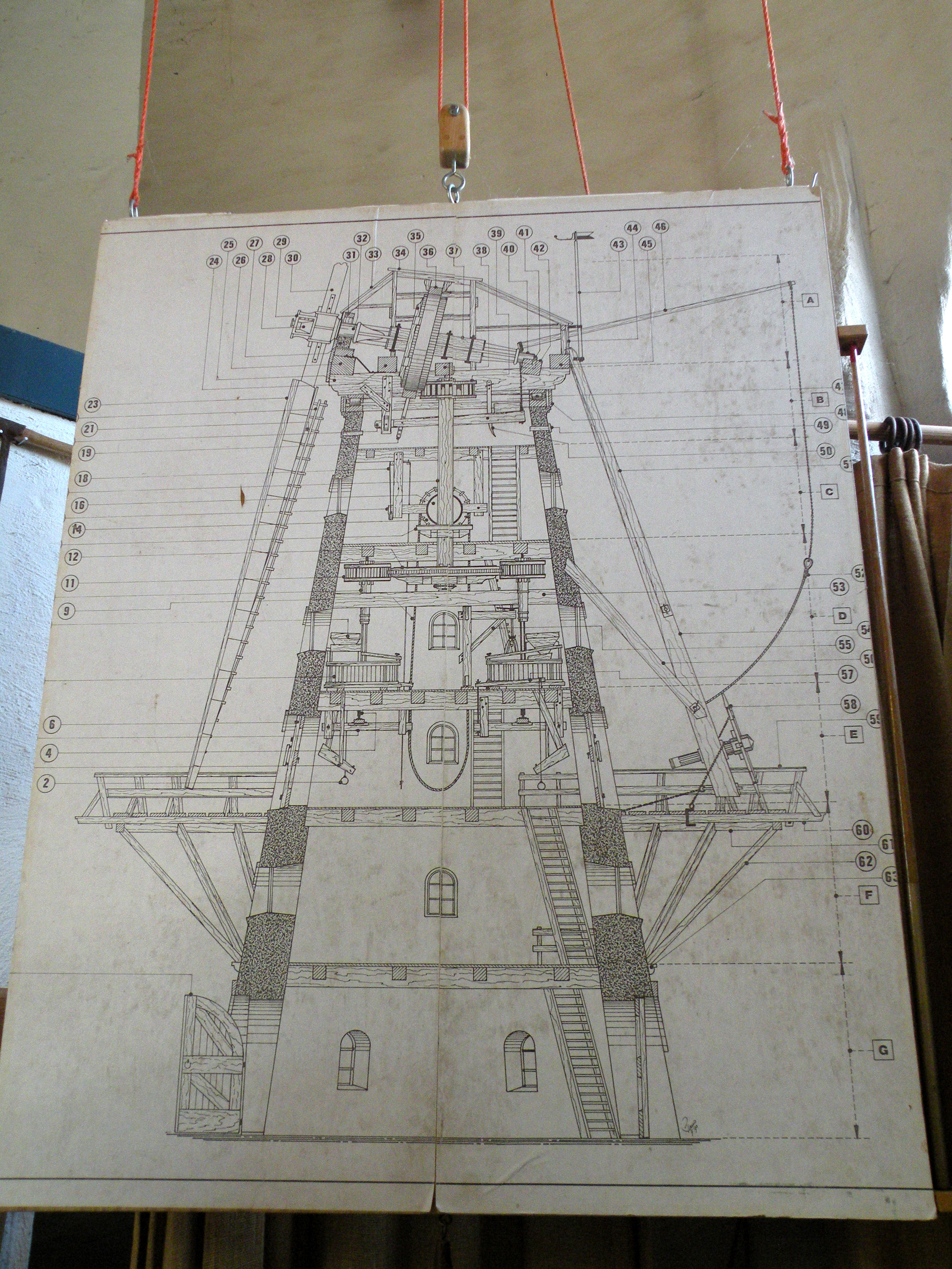 Interieurtekening van de molen Prins van Oranje, Buren